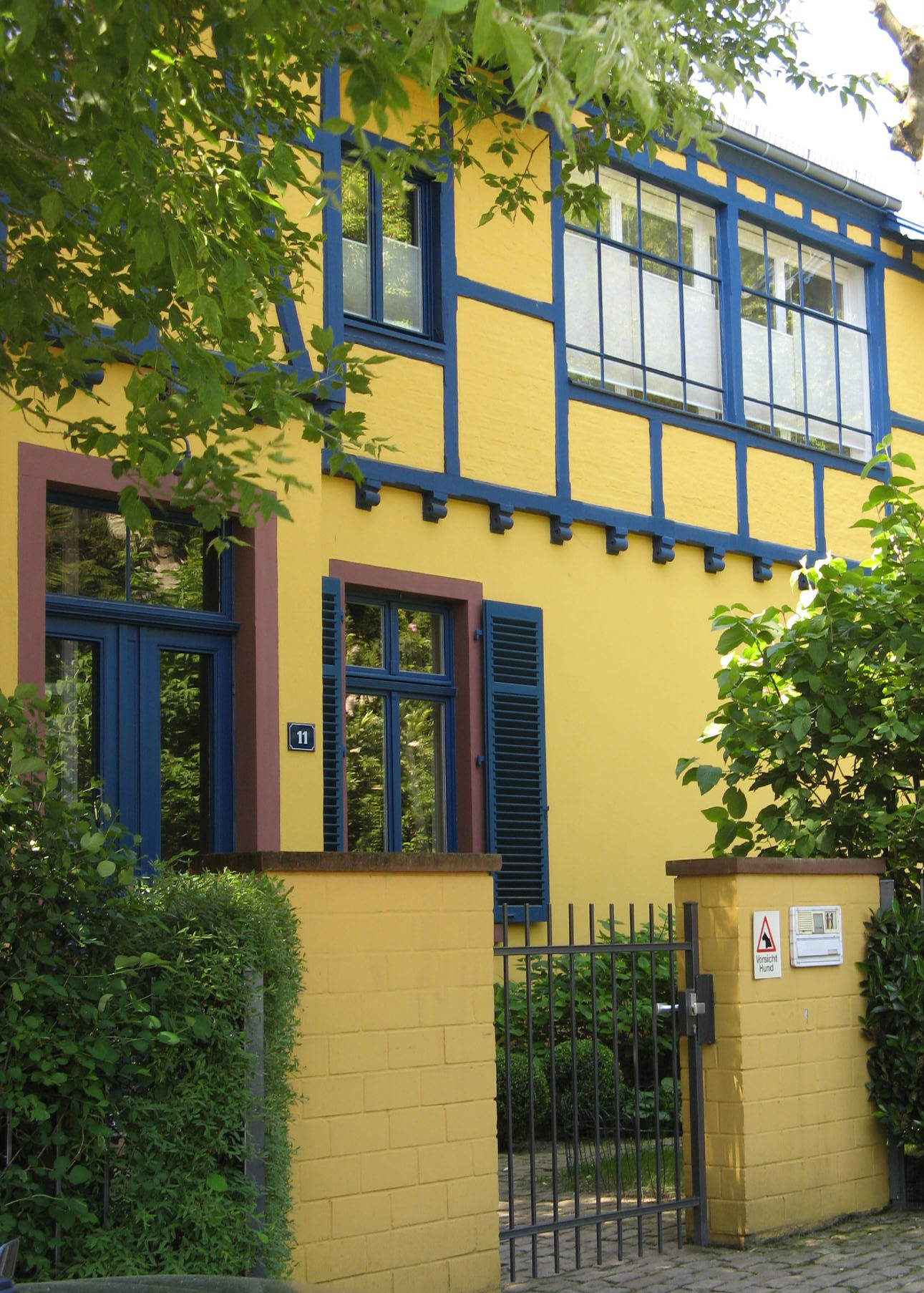 Hofheim am Taunus, denkmalgeschütztes Gebäude Kapellenstraße 11, das sog. Blaue Haus